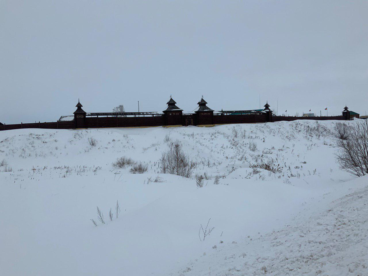 Татарча/tatarça: Фотосурәт Сәләт ВикиМәктәбенең Иске Казан музей тыюлыгына кылынган викисәфәр дәвамында төшерелгән.